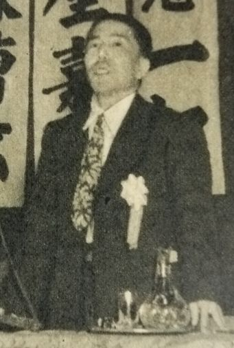 影山正治